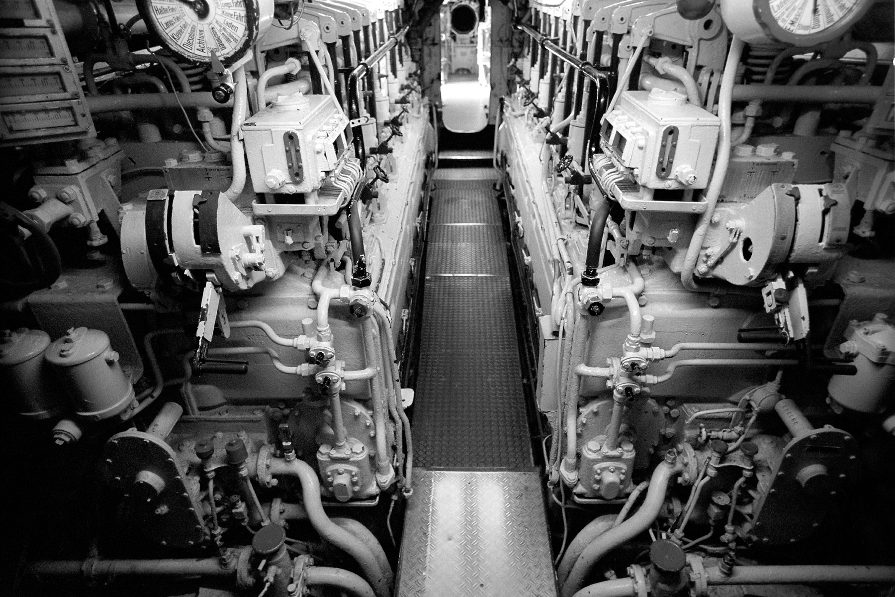 VII C U-Boot Dieselraum